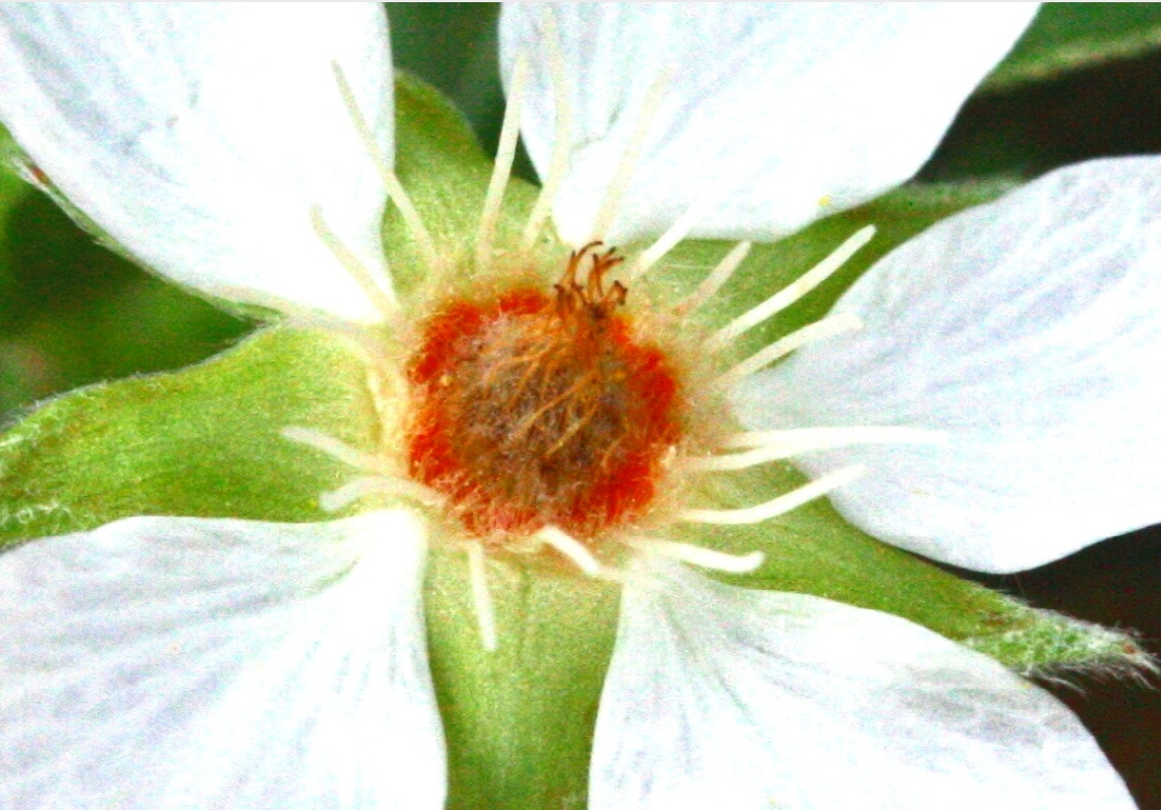 Potentilla_alba (Cinquefoglia bianca) Corlonch, Trichiana (BL), quota 580 m s.l.m.